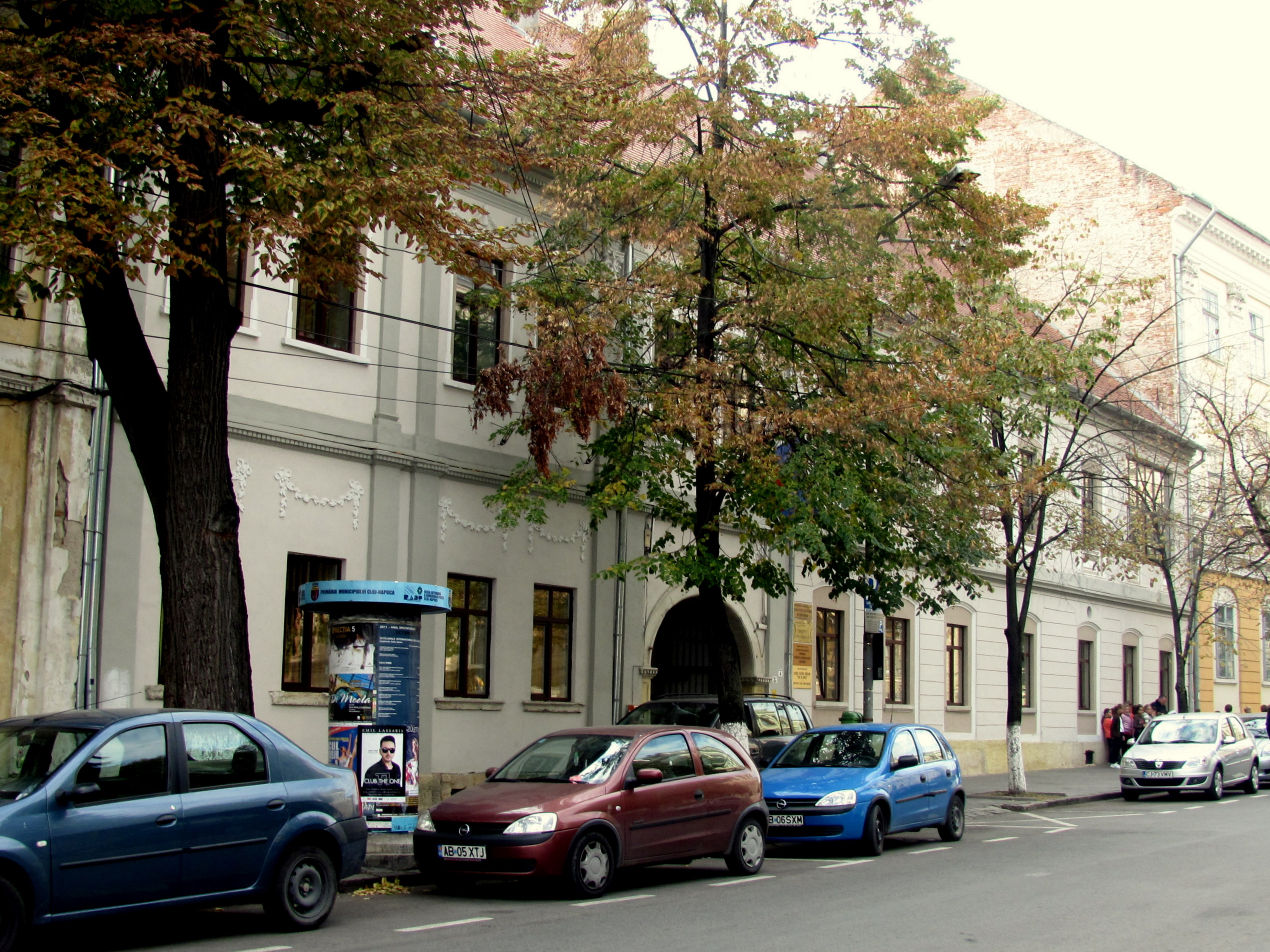 Cluj-Napoca, str. M.Kogălniceanu nr.4